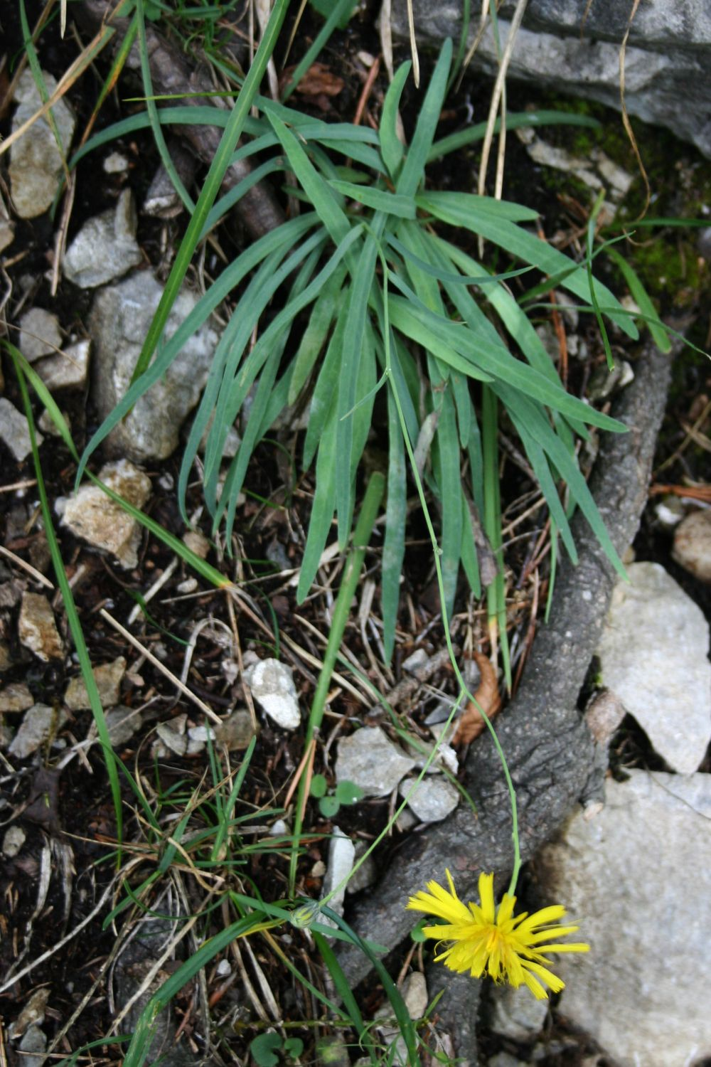 Hasenohr-Habichtskraut (Hieracium bupleuroides), Korbblütler (Asteraceae) – Österreich/Austria/Autriche: Steiermark, Grazer Bergland, Weizklamm 6–7 km NNW Weiz